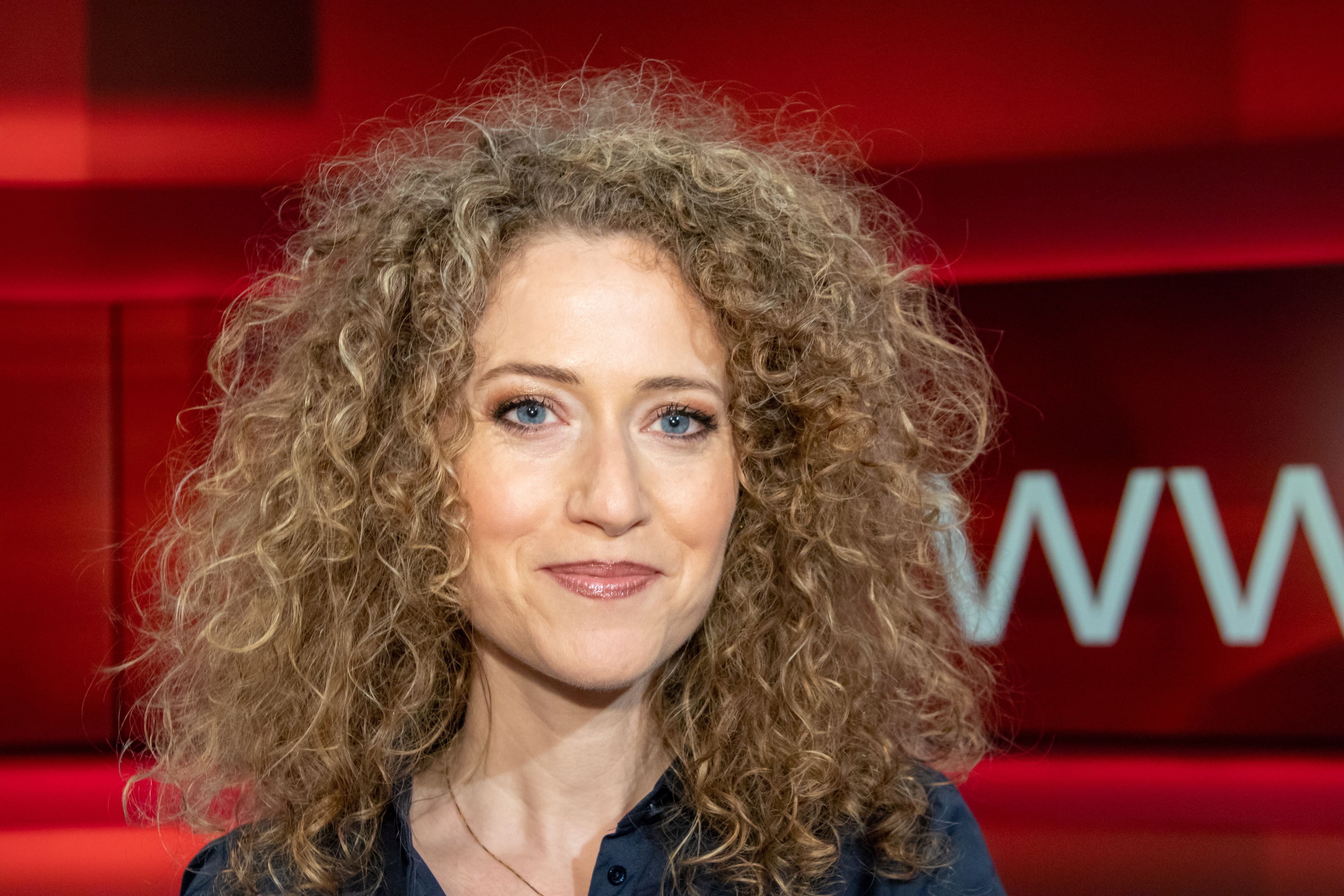 Melody Sucharewicz in der WDR-Sendung "hart aber fair" am 14.4.2018